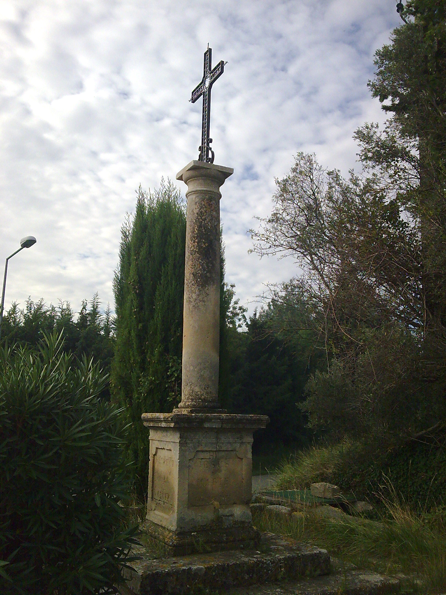 43°43′5″N 4°47′15.9″E / 43.71806°N 4.78775°E